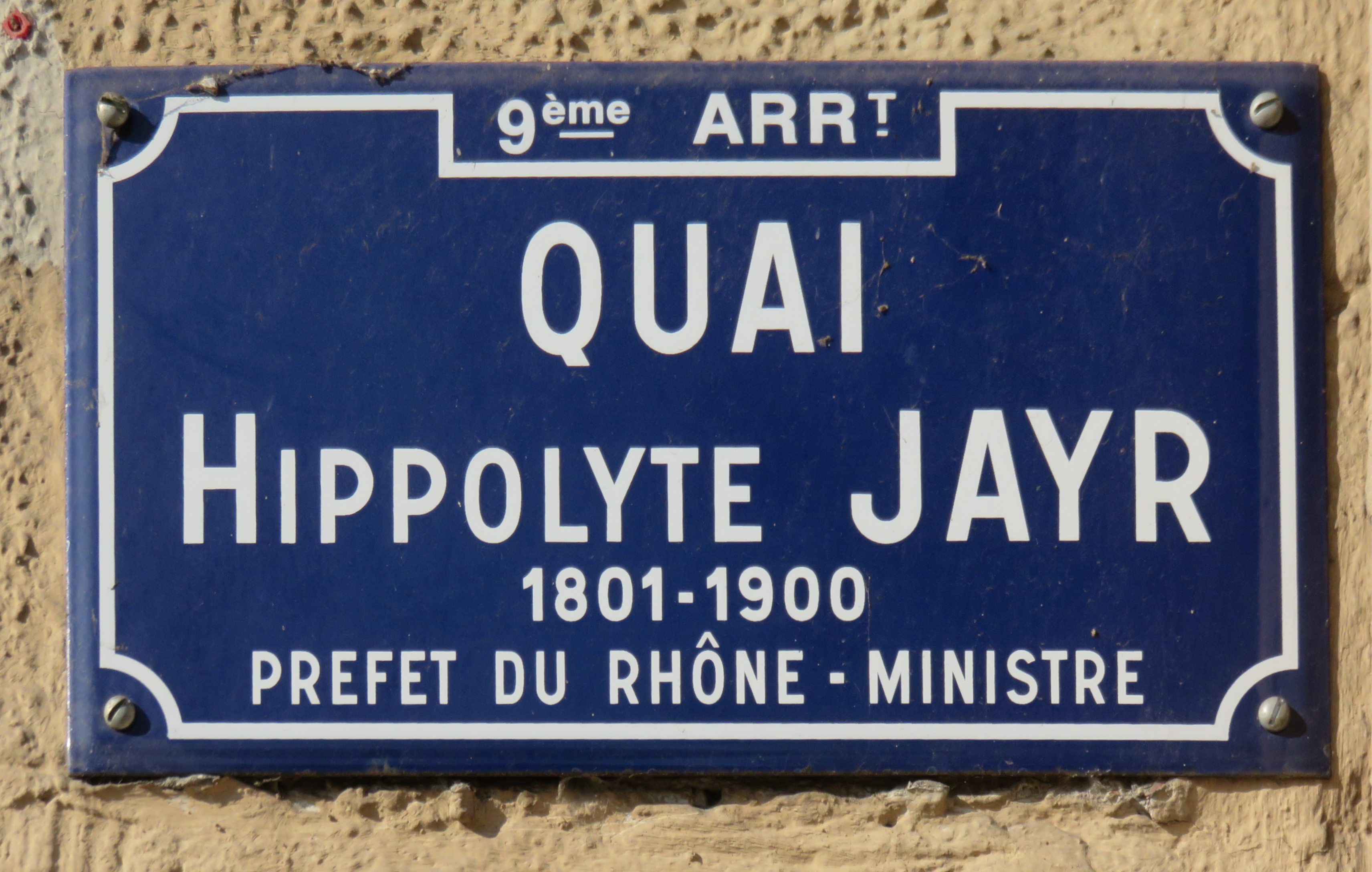 Plaque du quai Hippolyte-Jaÿr dans le 9e arrondissement de Lyon.